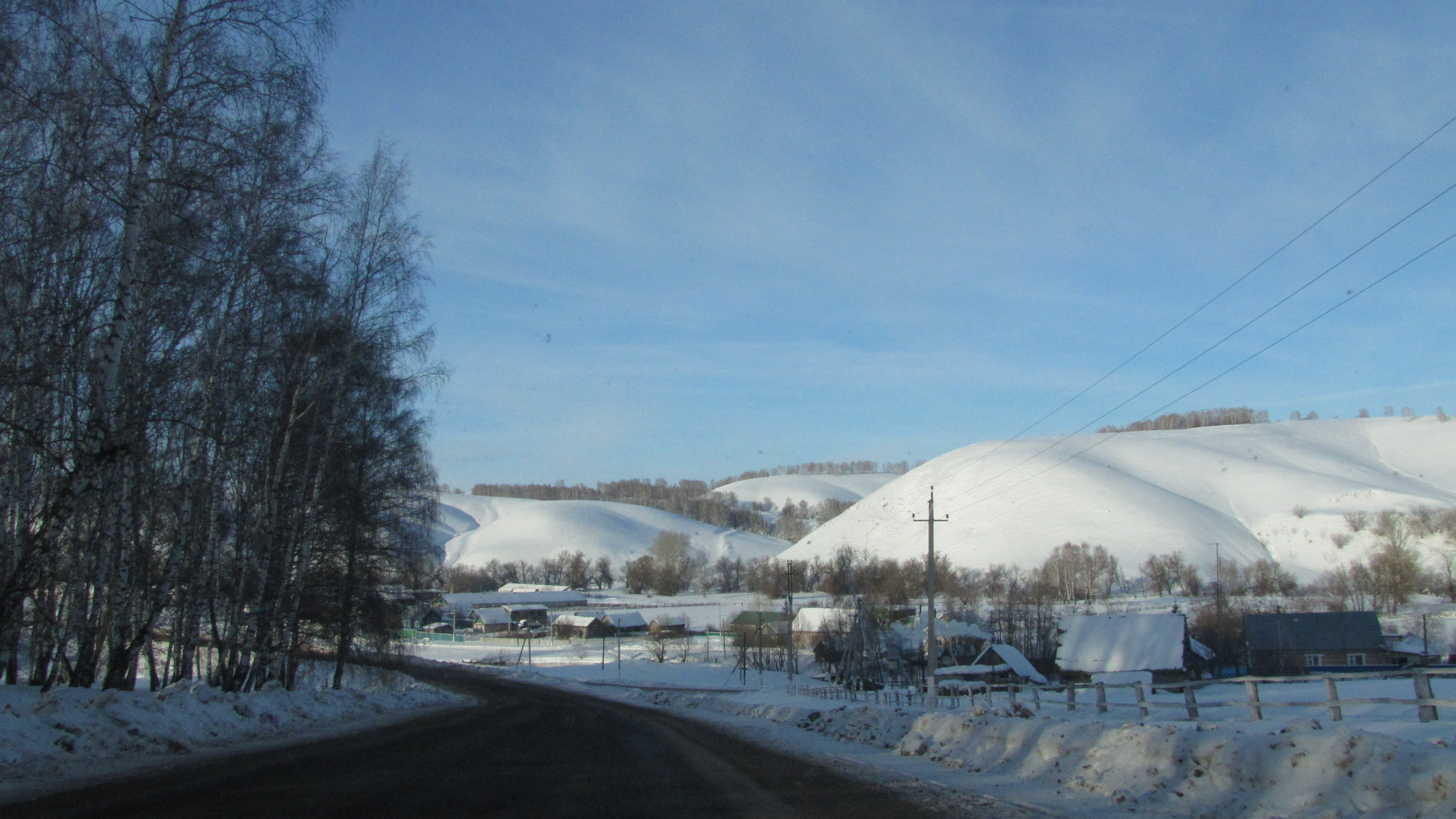 по дороге в Бижбуляк